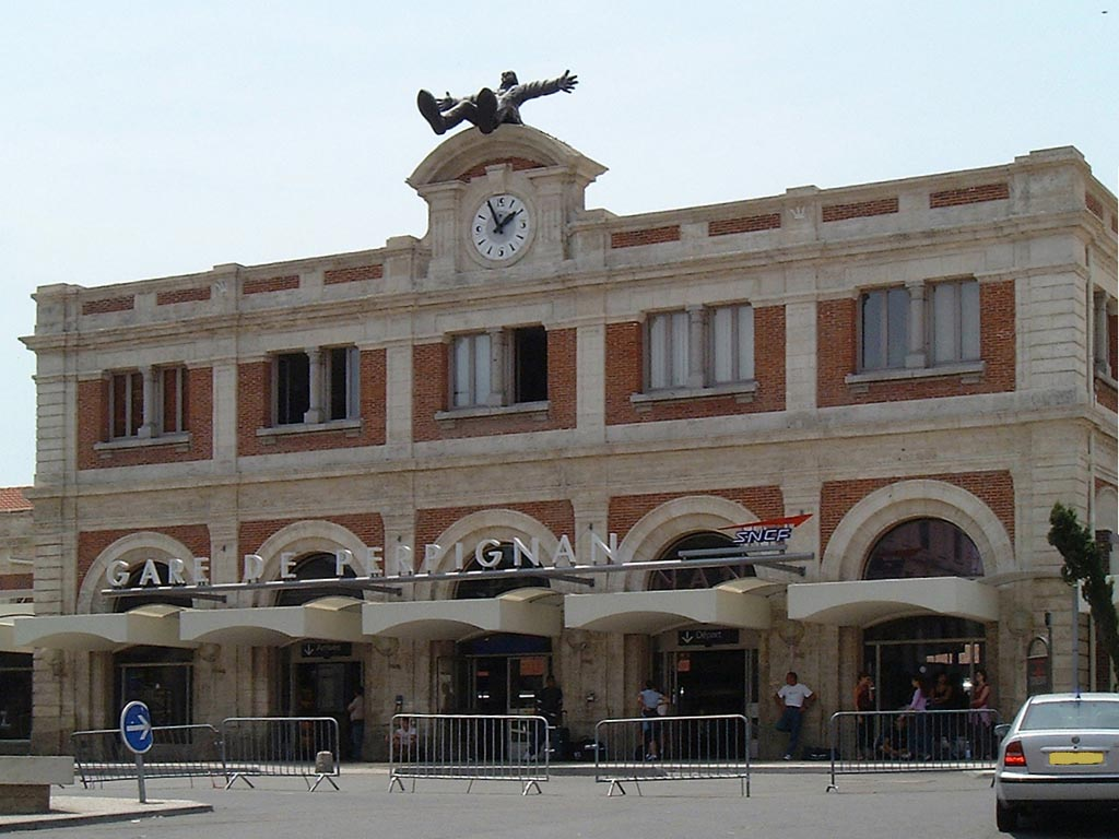 La gare de Perpignan (Pyrénées-Orientales, France).